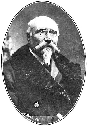 Retrato de José de Echegaray, obra del fotógrafo Kaulak, recogido en la revista española La Ilustración Española y Americana.